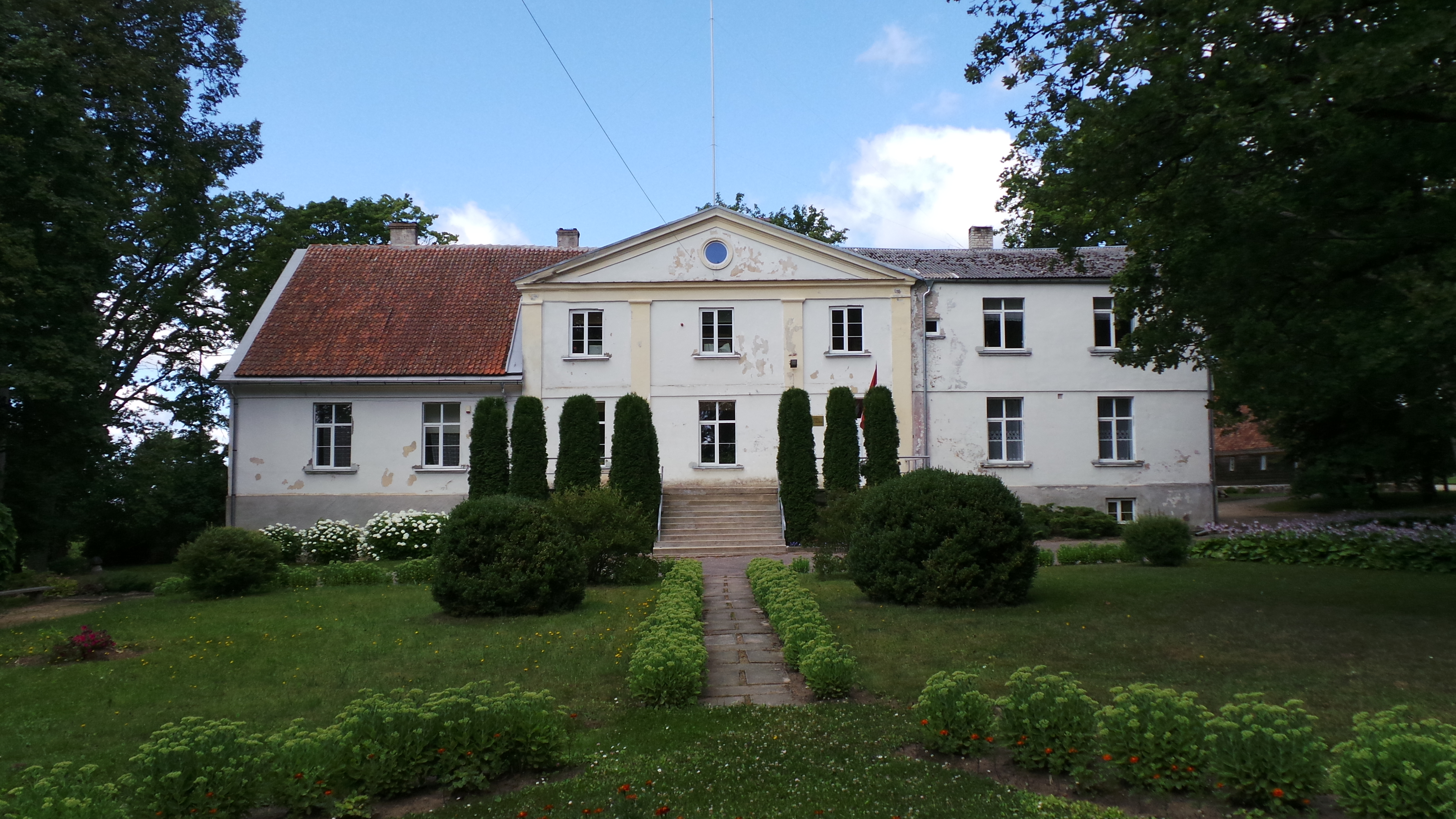 Biržu muiža - Kuldīgas pamatskolas Basu filiāle